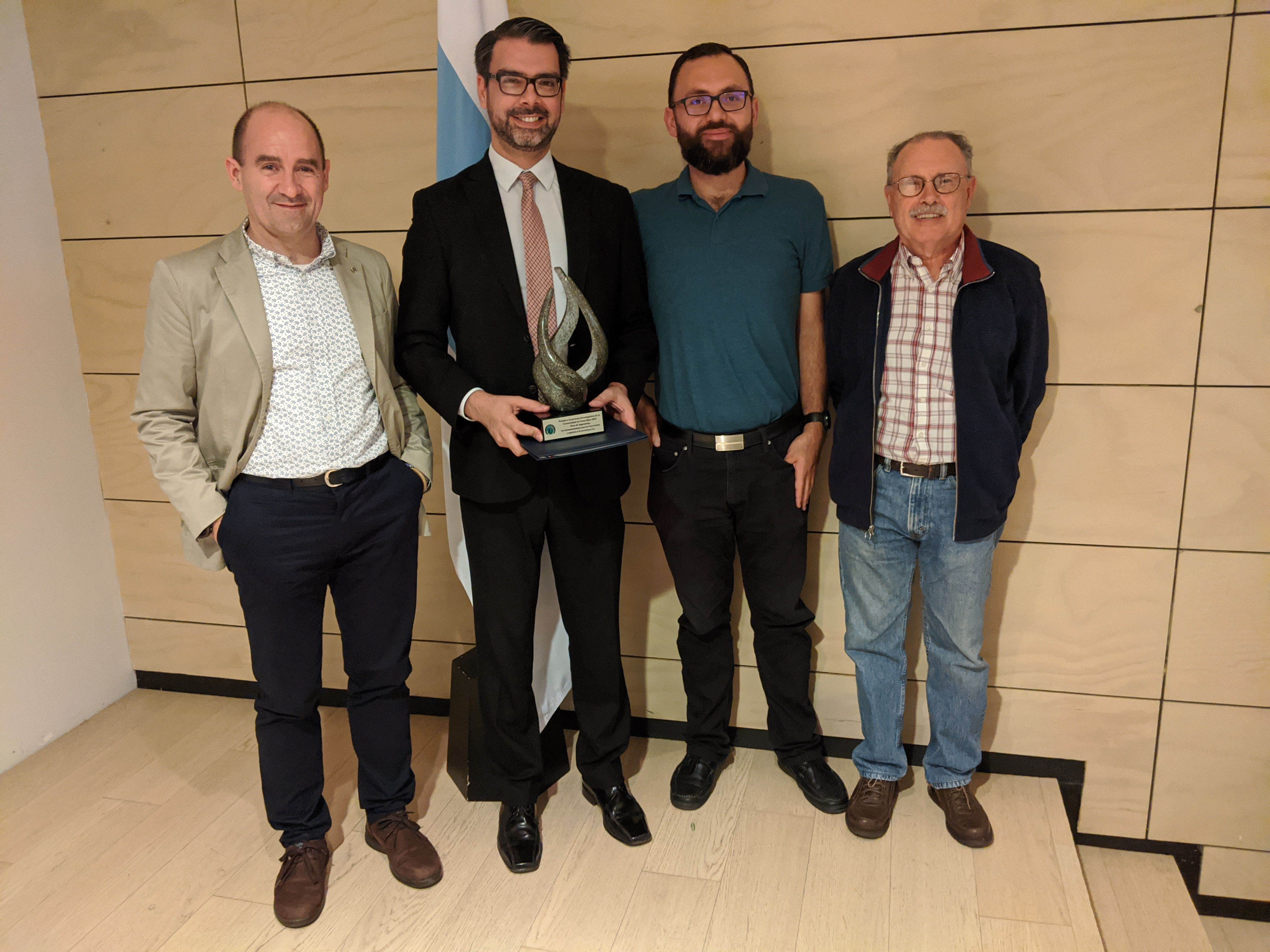 El profesor Orlando Arrieta (segundo en el orden usual) con sus colegas de investigación Ramón Vilanova, José David Rojas y Víctor Alfaro, en la recepción del Premio al Investigador del Año del Área de Ingeniería de la Universidad de Costa Rica.